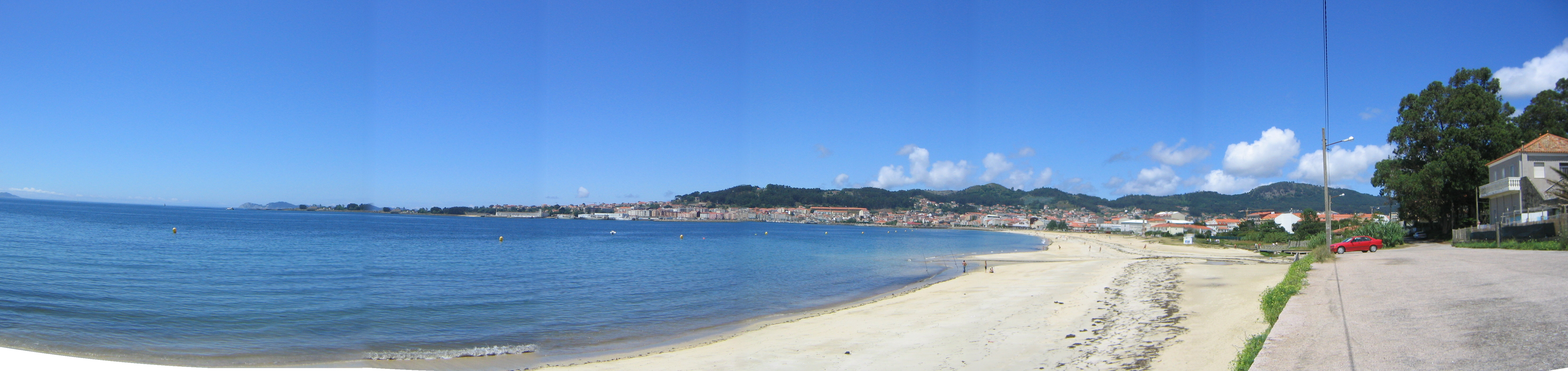 Cangas do Morrazo, playa de Rodeira. Pontevedra Galicia España